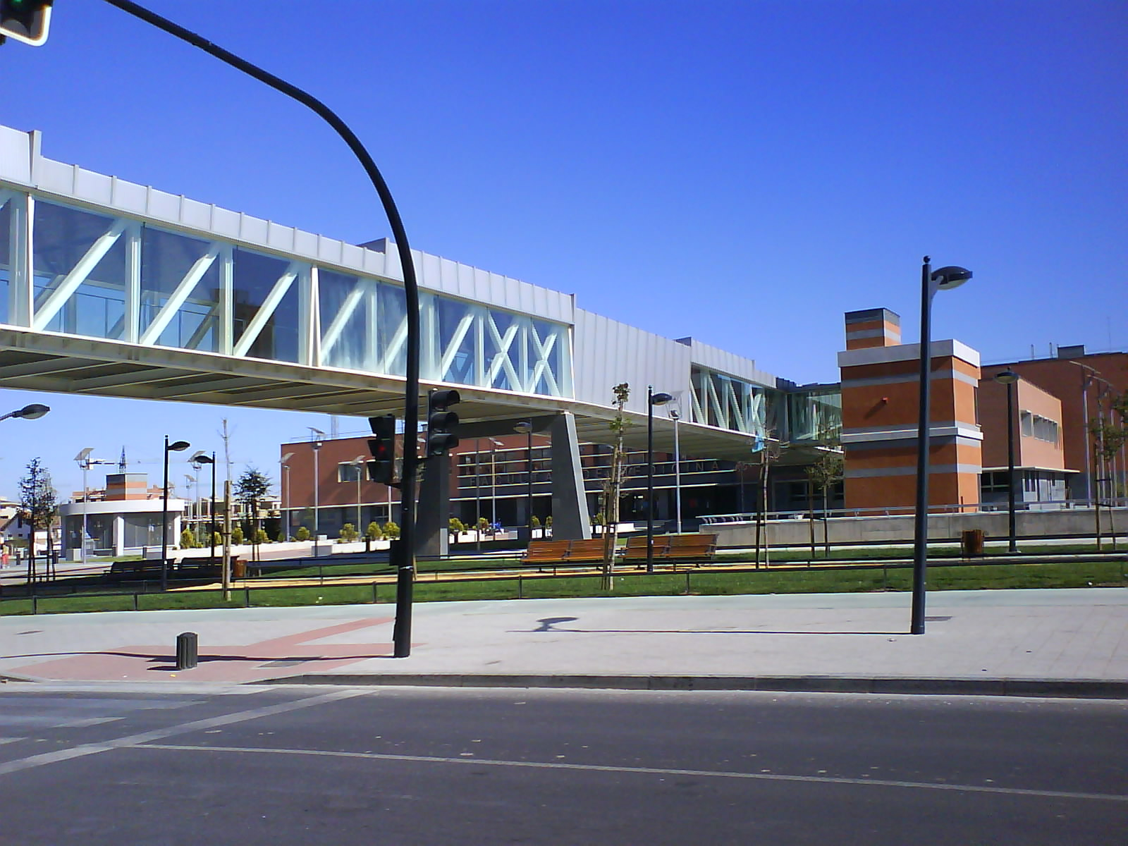 Pasarela sobre la calle Almansa de Albacete y Facultad de Medicina de la ciudad manchega.